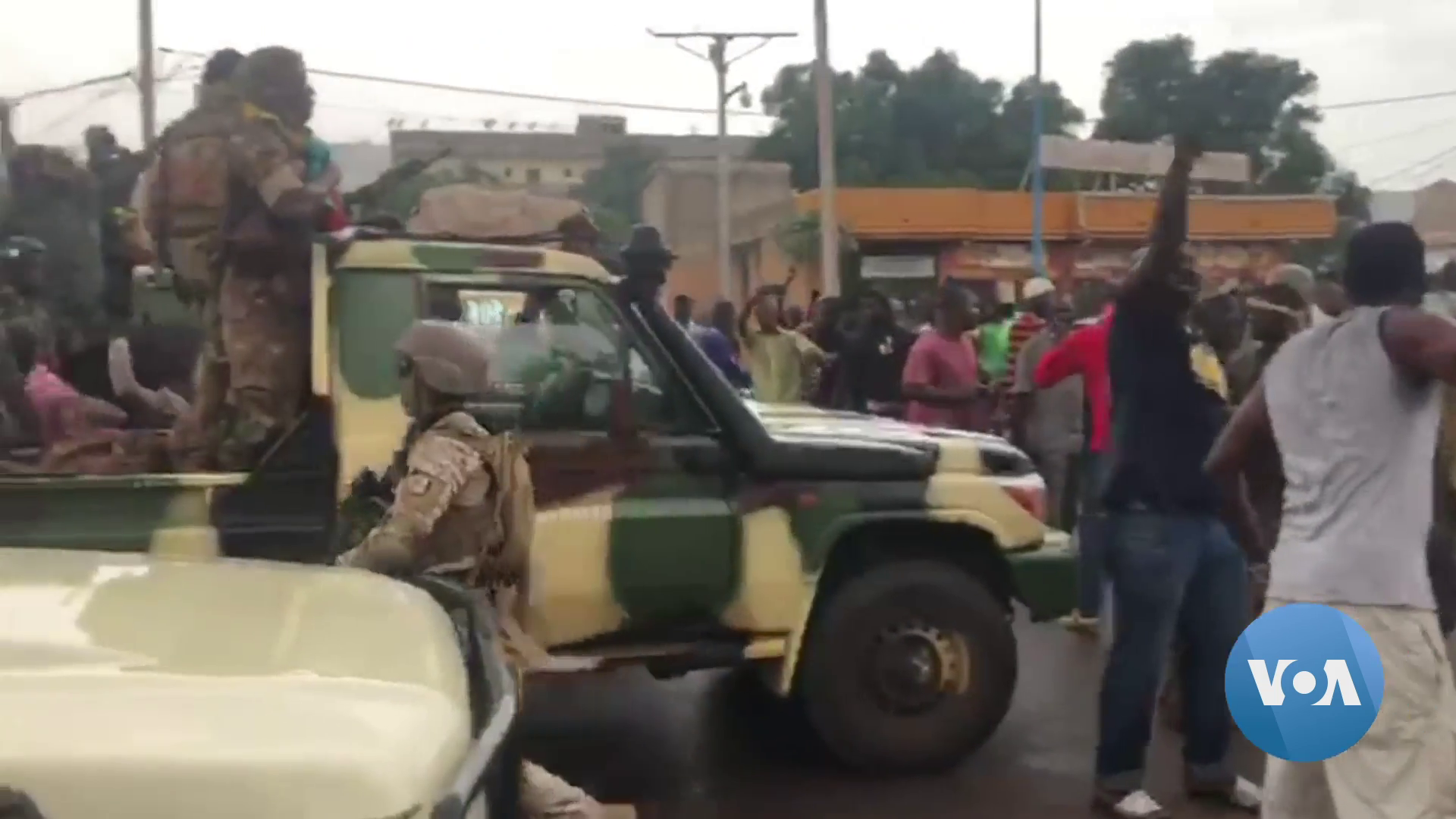 Streets of Bamako during the 2020 Malian coup d'état